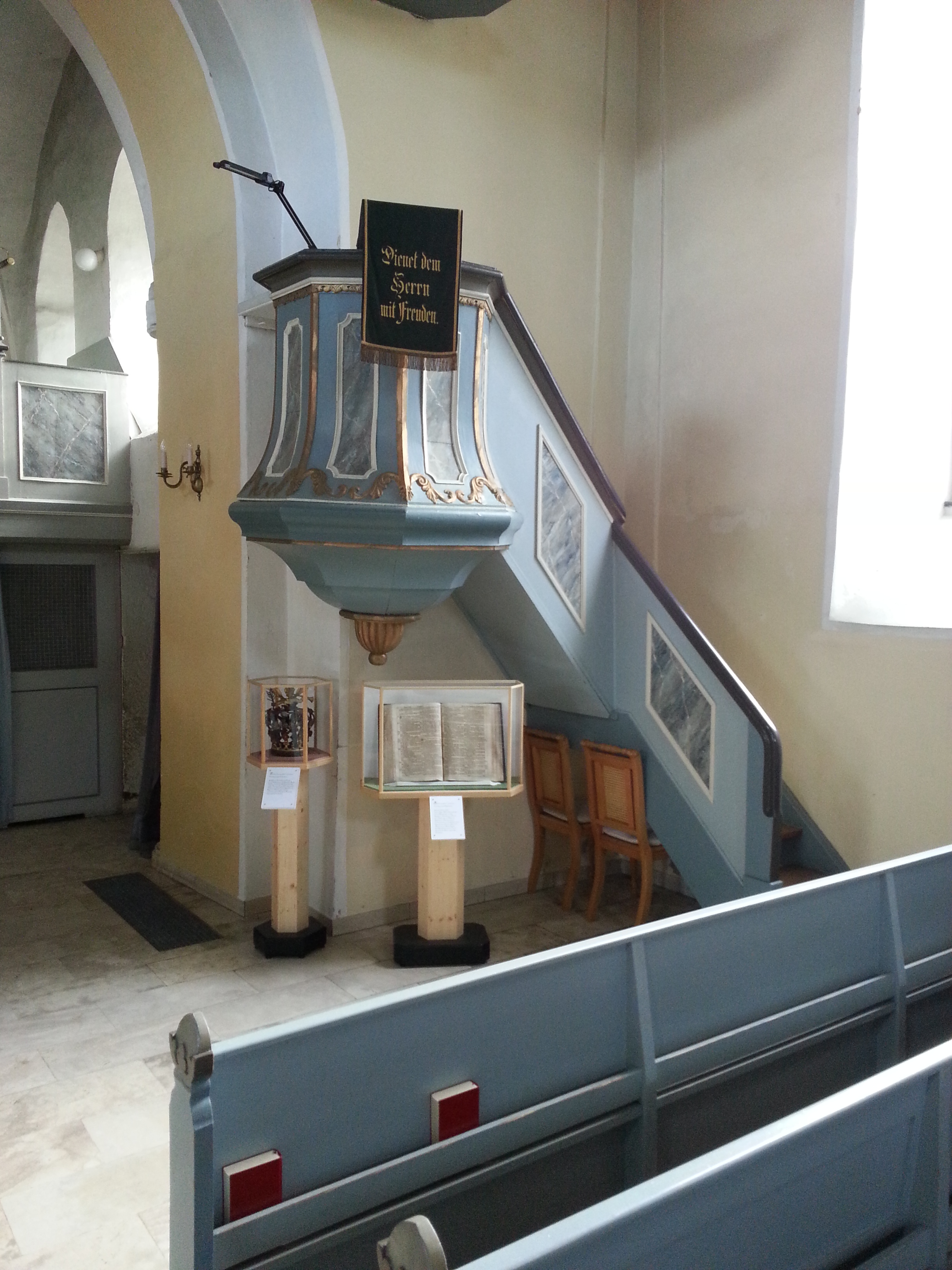 Kanzel der Evangelischen Kirche Bettenhausen, Hessen